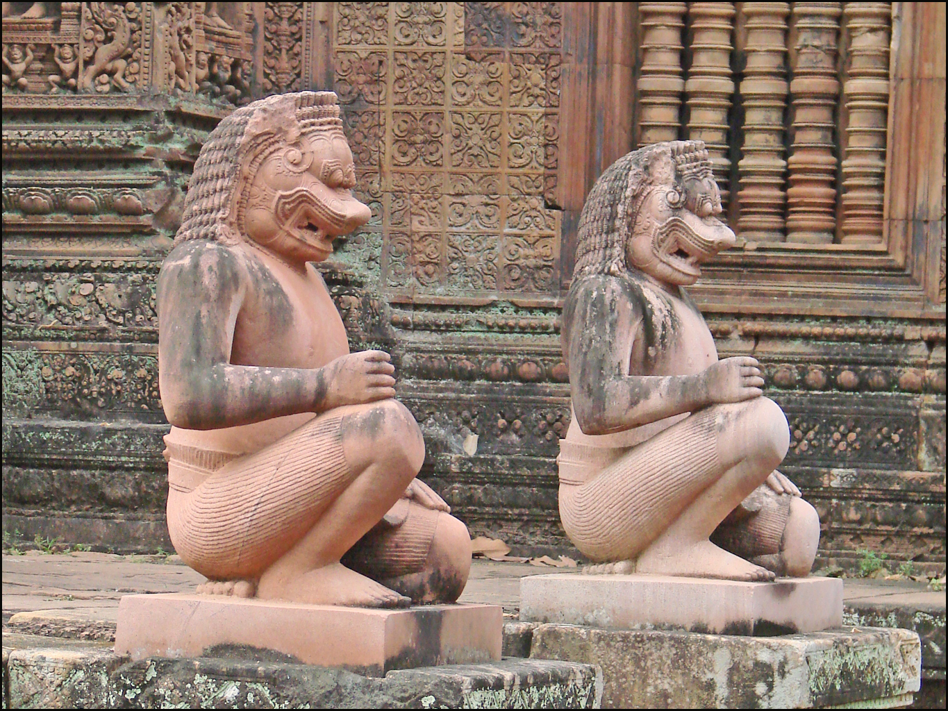 Gardiens à têtes d'animaux du sanctuaire central coté sud assis sur les échiffres de l'escalier est Le sanctuaire central est situé au centre de la première enceinte, il est construit sur une terrasse en forme de T et composé de trois tours. ______________ Banteay Srei veut dire "citadelle des femmes", c'est le nom moderne du temple d'Ishvarapura, "ville du seigneur". Il a été construit en grès rose, un matériau très résistant qui a permis - d'une part de réaliser des décors d'une grande finesse - d'autre part, de les conserver jusqu'à nos jours. Ce temple est consacré au dieu "seigneur suprême des trois mondes" en 967, à la fin du règne du roi Rajendravarman II (944-968). Il a été construit par l'un des conseillers du roi. Banteay Srei a été rendu célèbre par André Malraux qui, en 1923, tenta d'y voler quatre Apsaras.